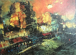 宮本豊蔵 パリ 夕映えの街